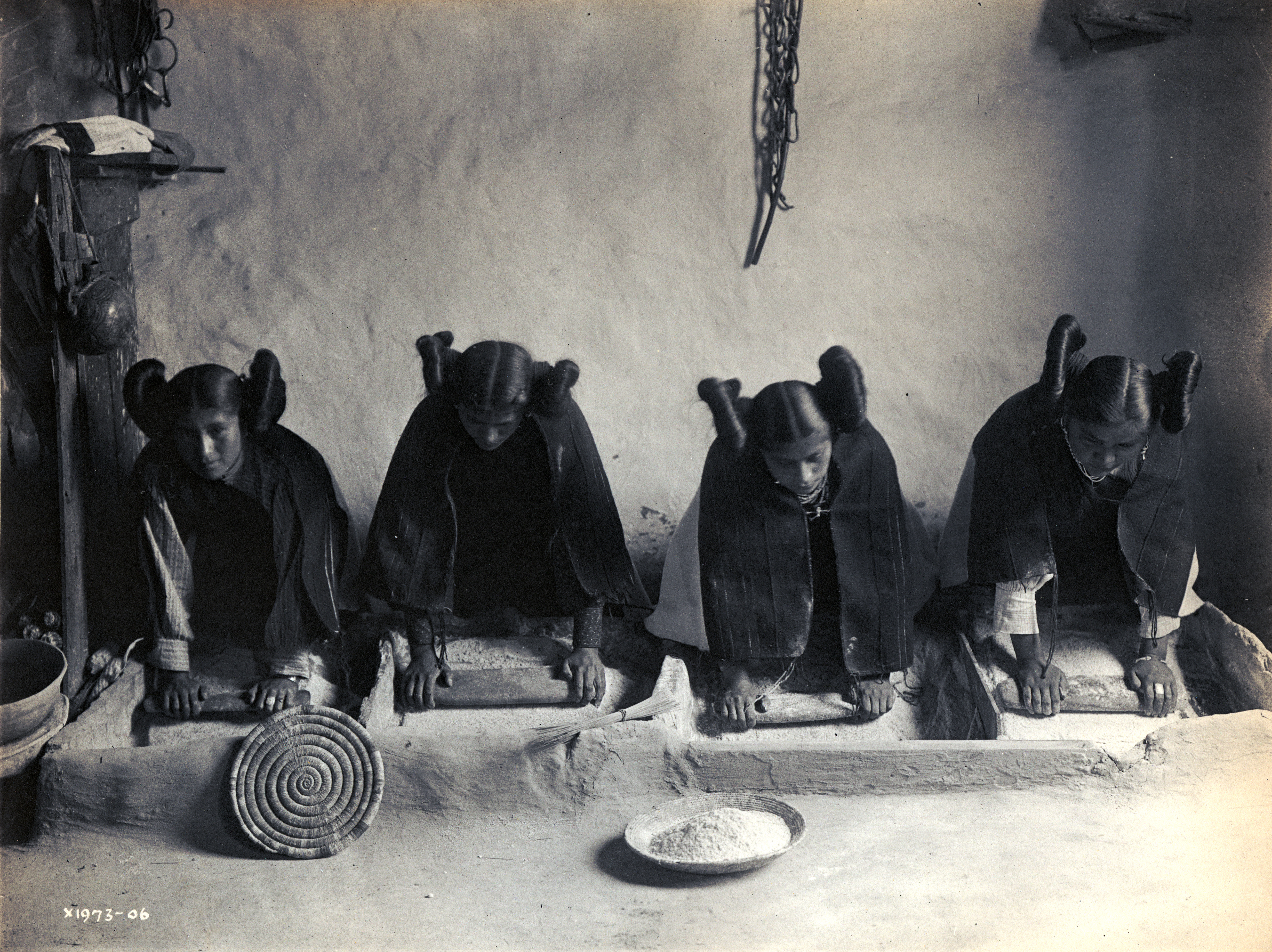 Four Hopi Indian maidens grinding grain.